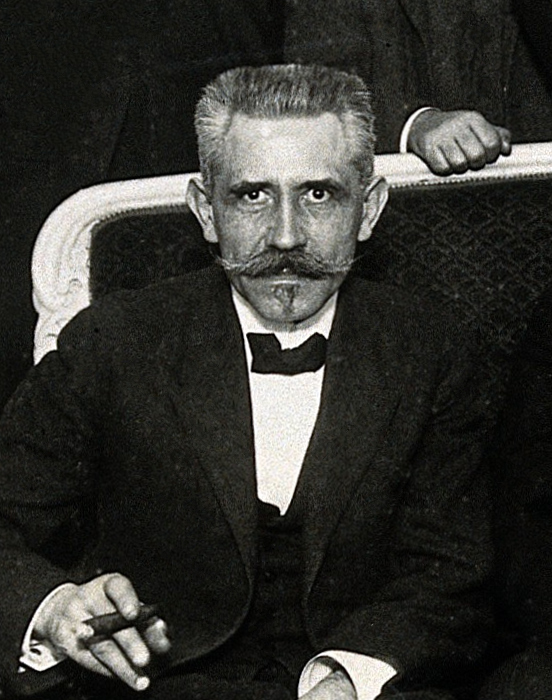 Lunch in honour of Albert Einstein, Langevin